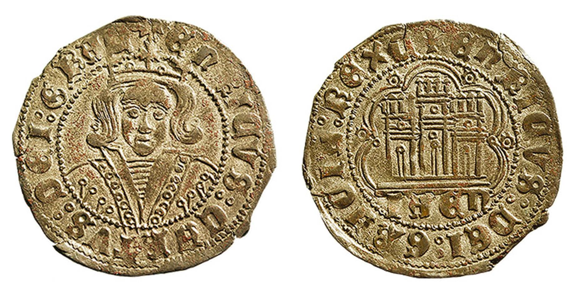 Moneda de Enrique IV de Castilla y de León. Cuartillo. Vellón. Jaén. Fuente citada: Álvarez Burgos, F. Catálogo general de la Moneda medieval Castellano-Leonesa, siglos XI-XV. Madrid, 1998, p.746,2.